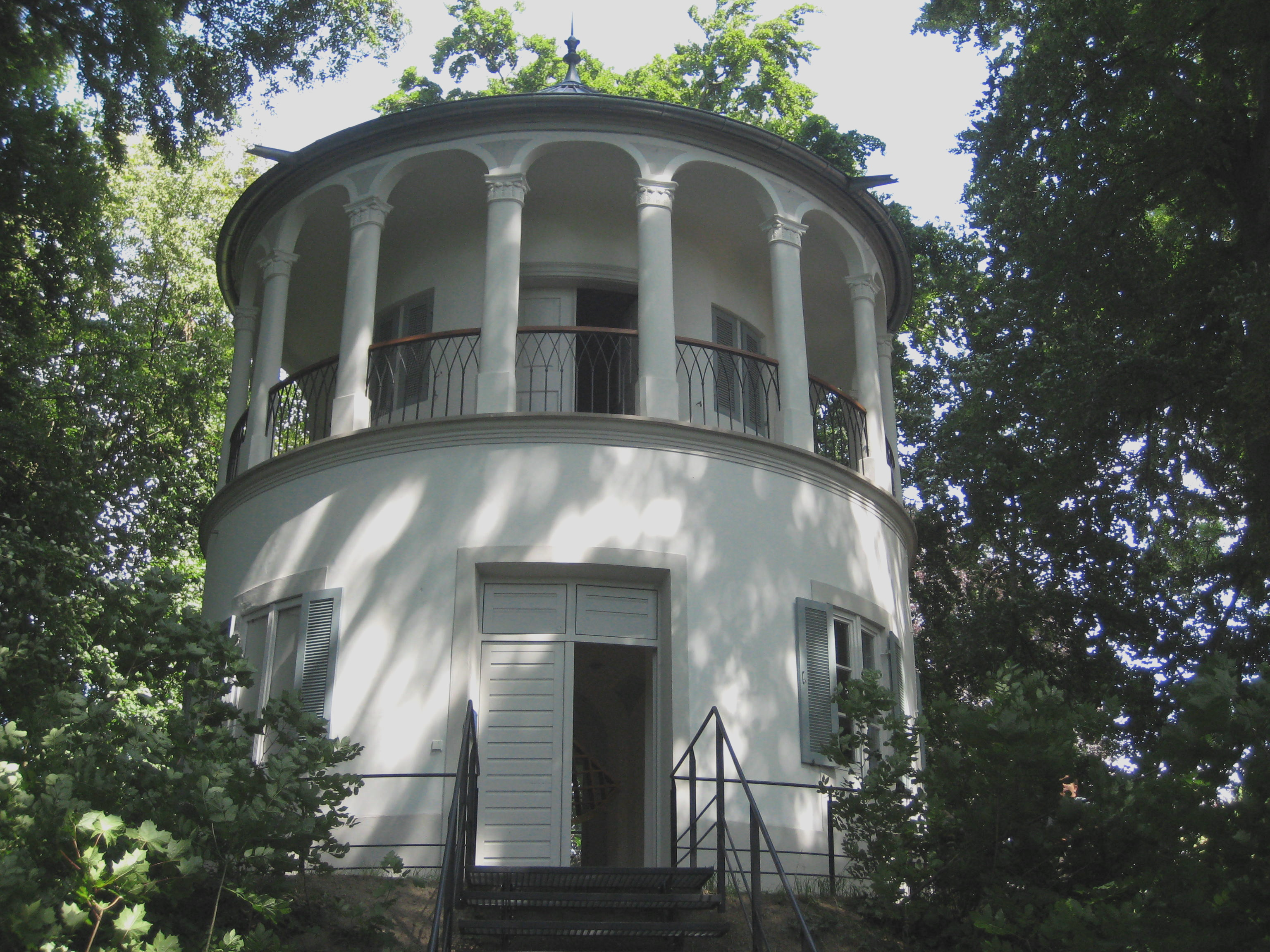 Bauwerk in Augsburg-Göggingen, 18./19. Jahrhundert